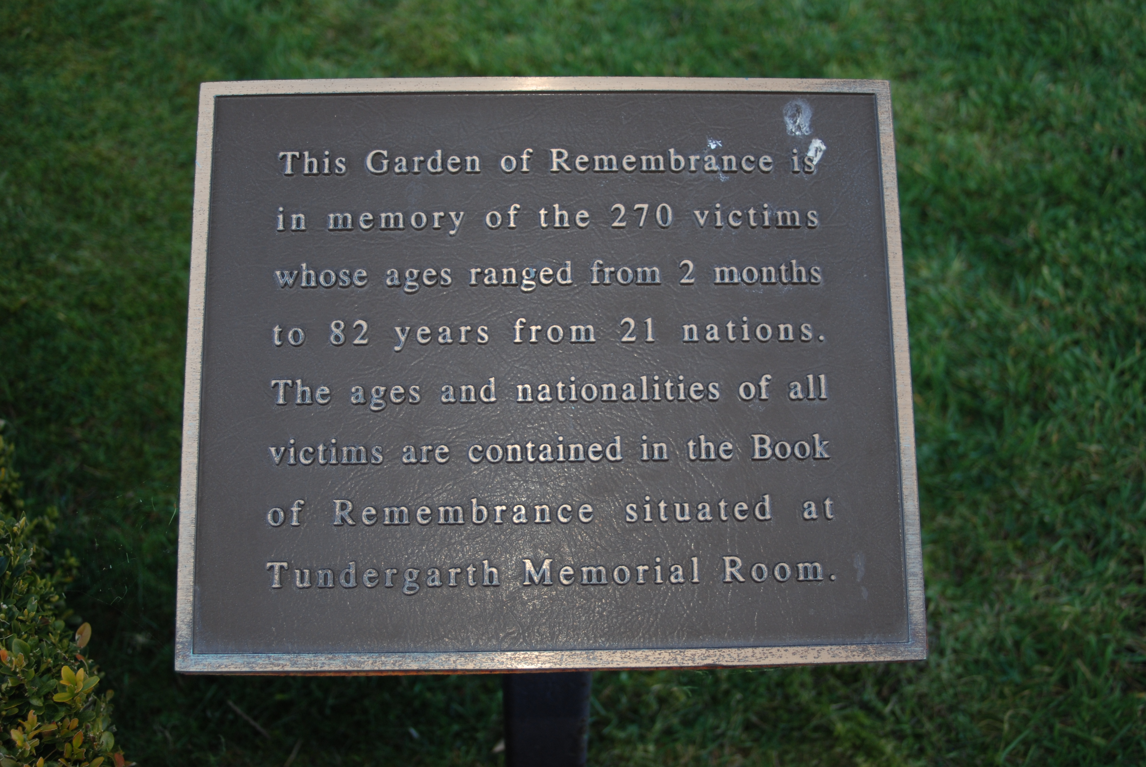 Sign in Garden of remembrance for Lockerbie disaster (Lockerbie)